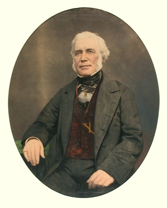 Photographie peinte Peter McGill, Montréal, QC, 1861 William Notman (1826-1891) 1861, 19e siècle Papier albuminé 56 x 49 cm N-0000.6